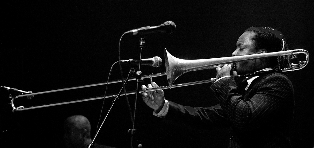 Dennis Rollins